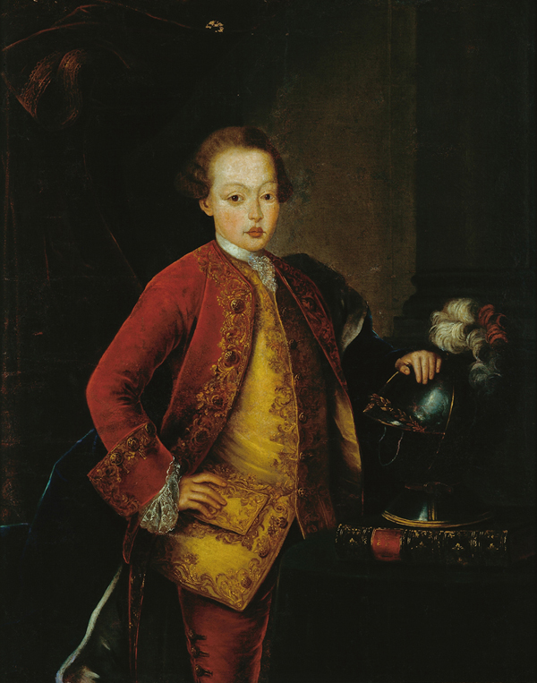 Portrait of Jose de Braganca (1761-1788)